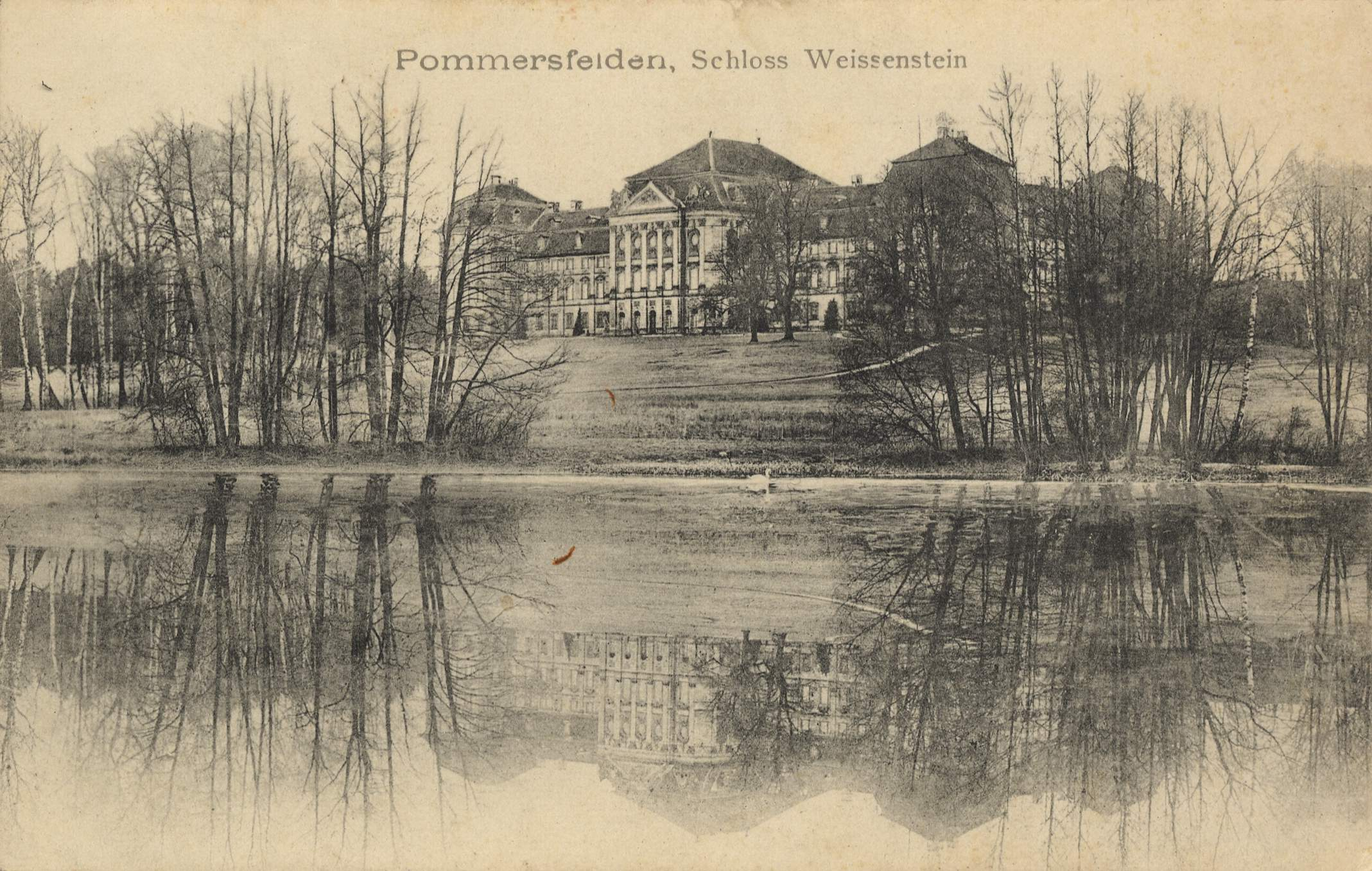 Schloss Weißenstein (Pommersfelden)